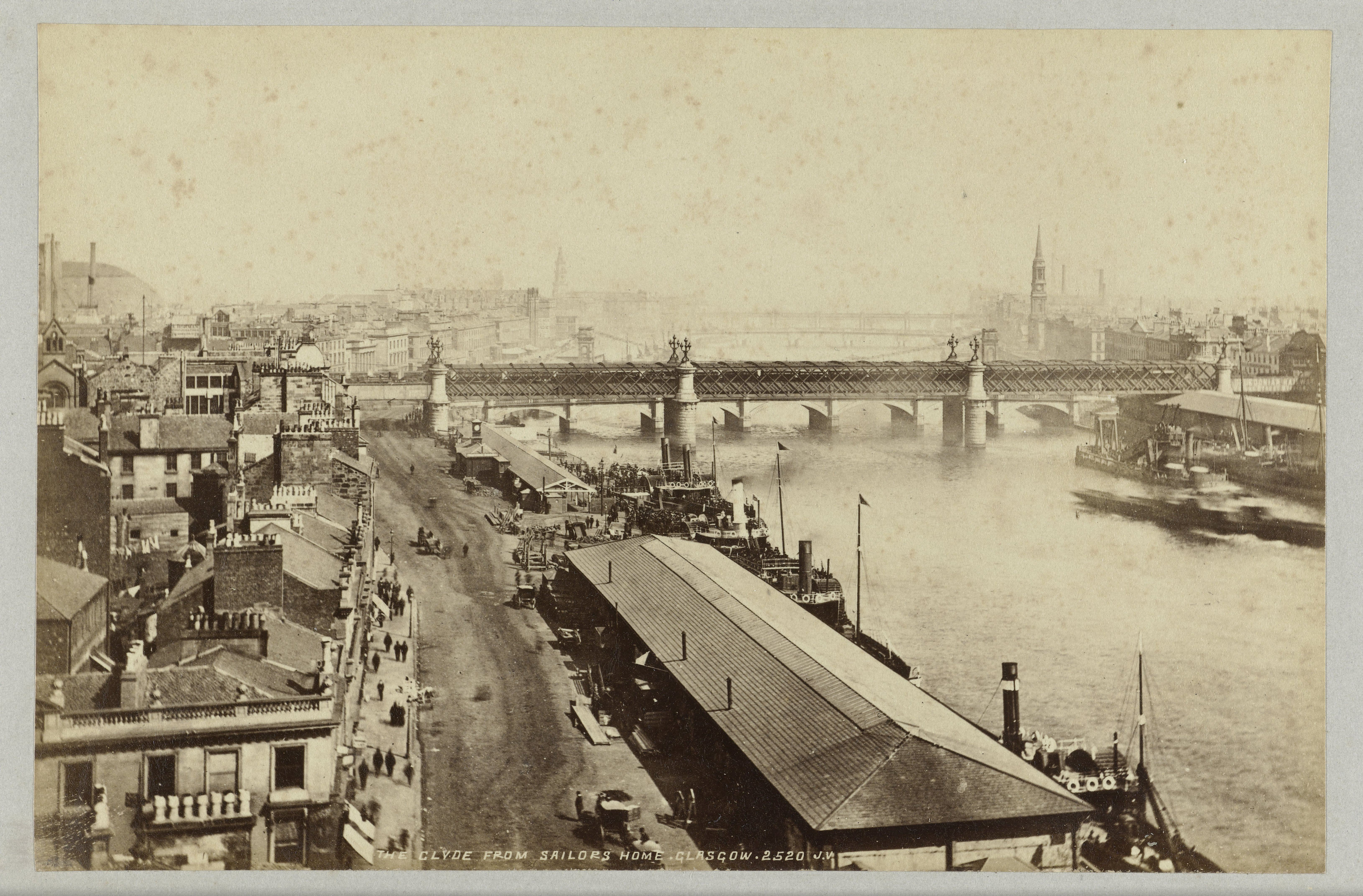 IdentificatieTitel(s): Gezicht in GlasgowThe Clyde from Sailors Home (titel op object)Objecttype: foto Objectnummer: RP-F-F01864Opschriften / Merken: titel, recto onder, meegedrukt met negatief: ‘The Clyde from Sailors Home, Glasgow 2520 J.V.’VervaardigingVervaardiger: fotograaf: James Valentine (vermeld op object)Plaats vervaardiging: Groot-BrittanniëDatering: 1870 - 1900Fysieke kenmerken: albuminedrukMateriaal: papier karton Techniek: albuminedrukAfmetingen: foto: h 134 mm × b 203 mmblad: h 244 mm × b 316 mmOnderwerpWaar: GlasgowVerwerving en rechtenVerwerving: overdracht van beheer 1994Copyright: Publiek domein